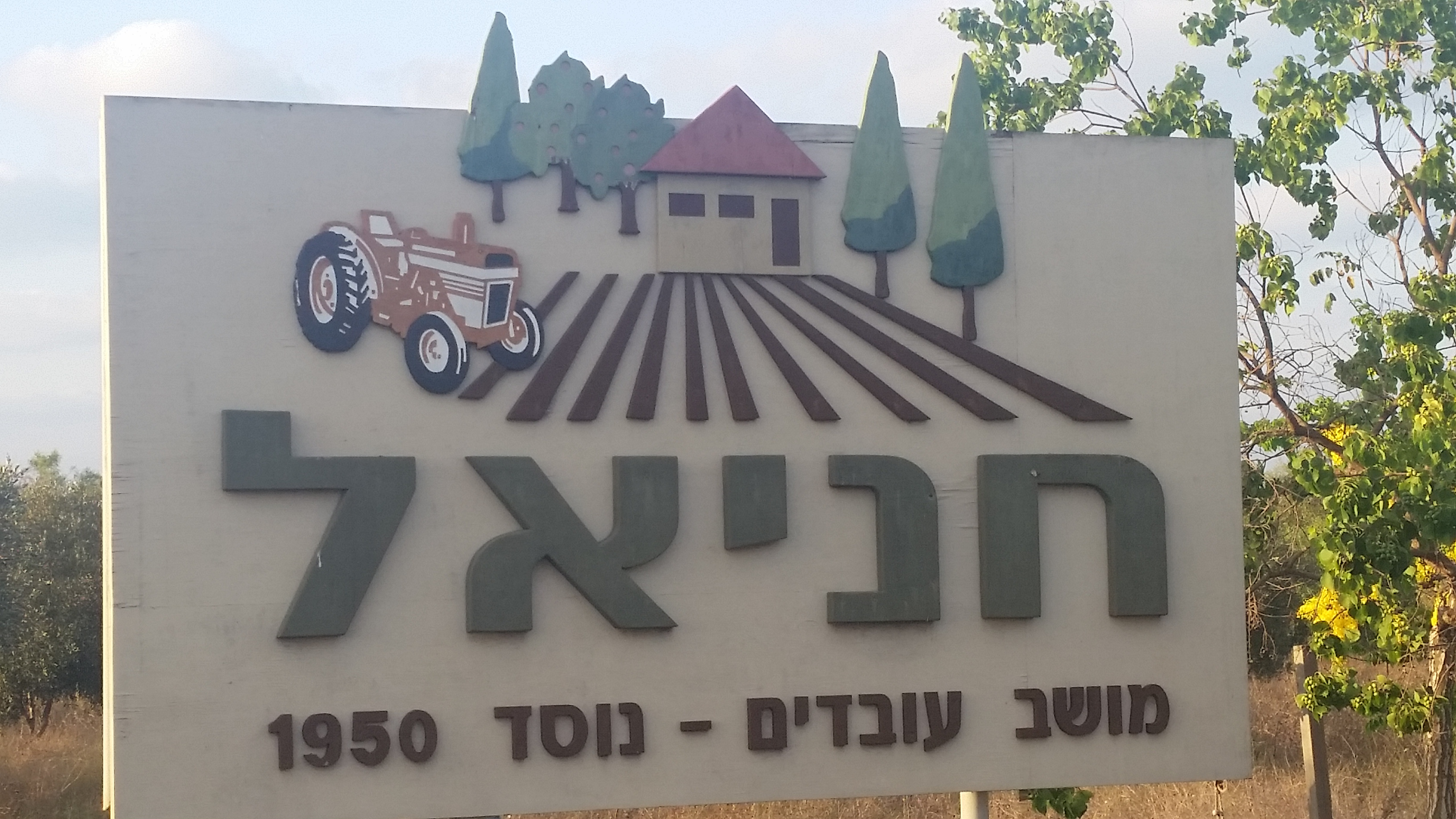 סמל מושב חניאל